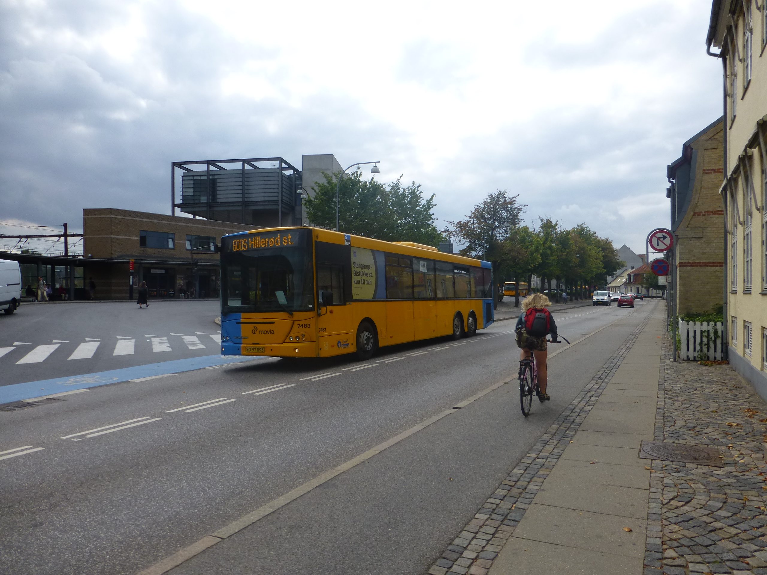 Movia bus line 600S at Roskilde Station in Denmark.